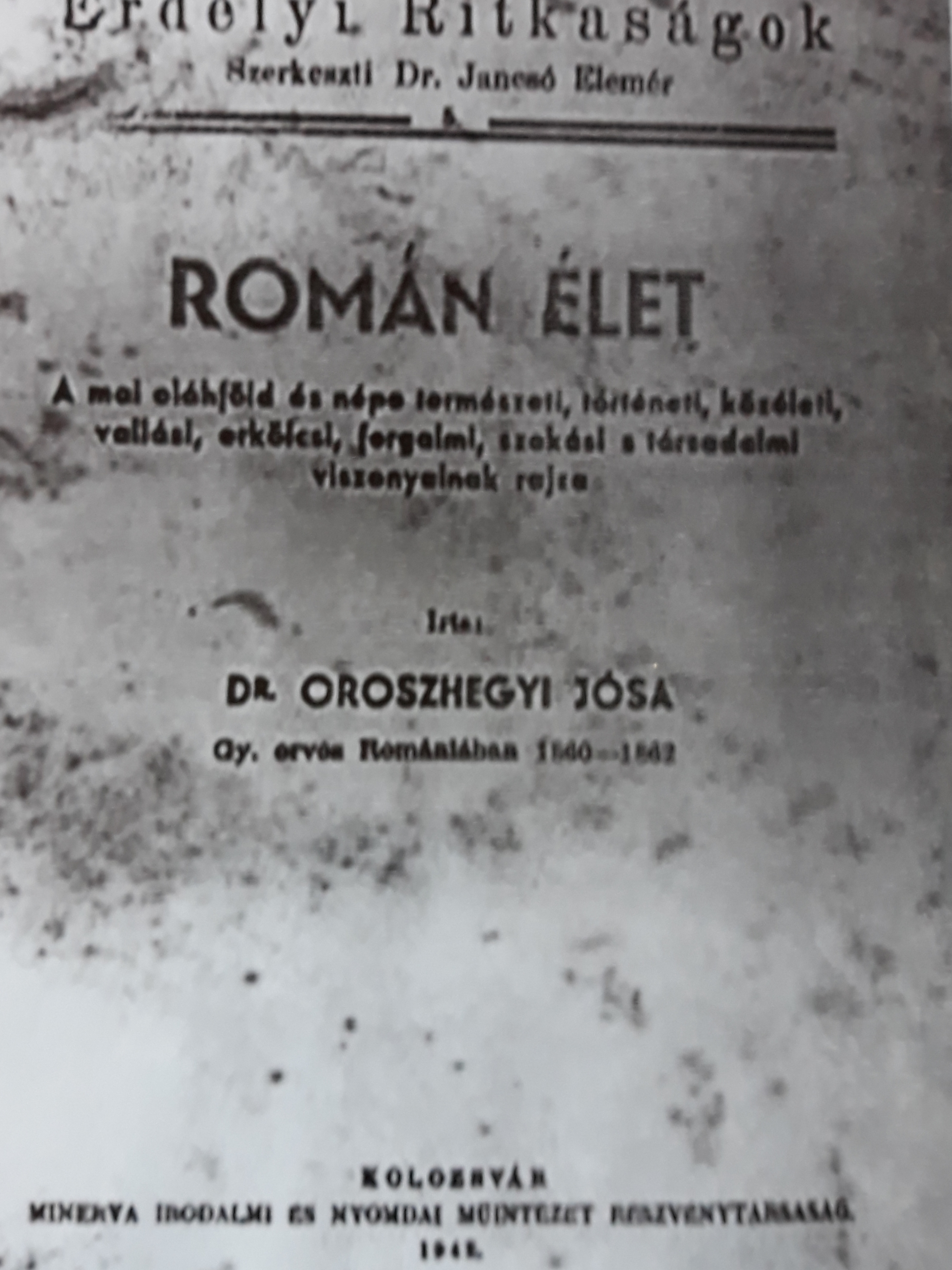 műve